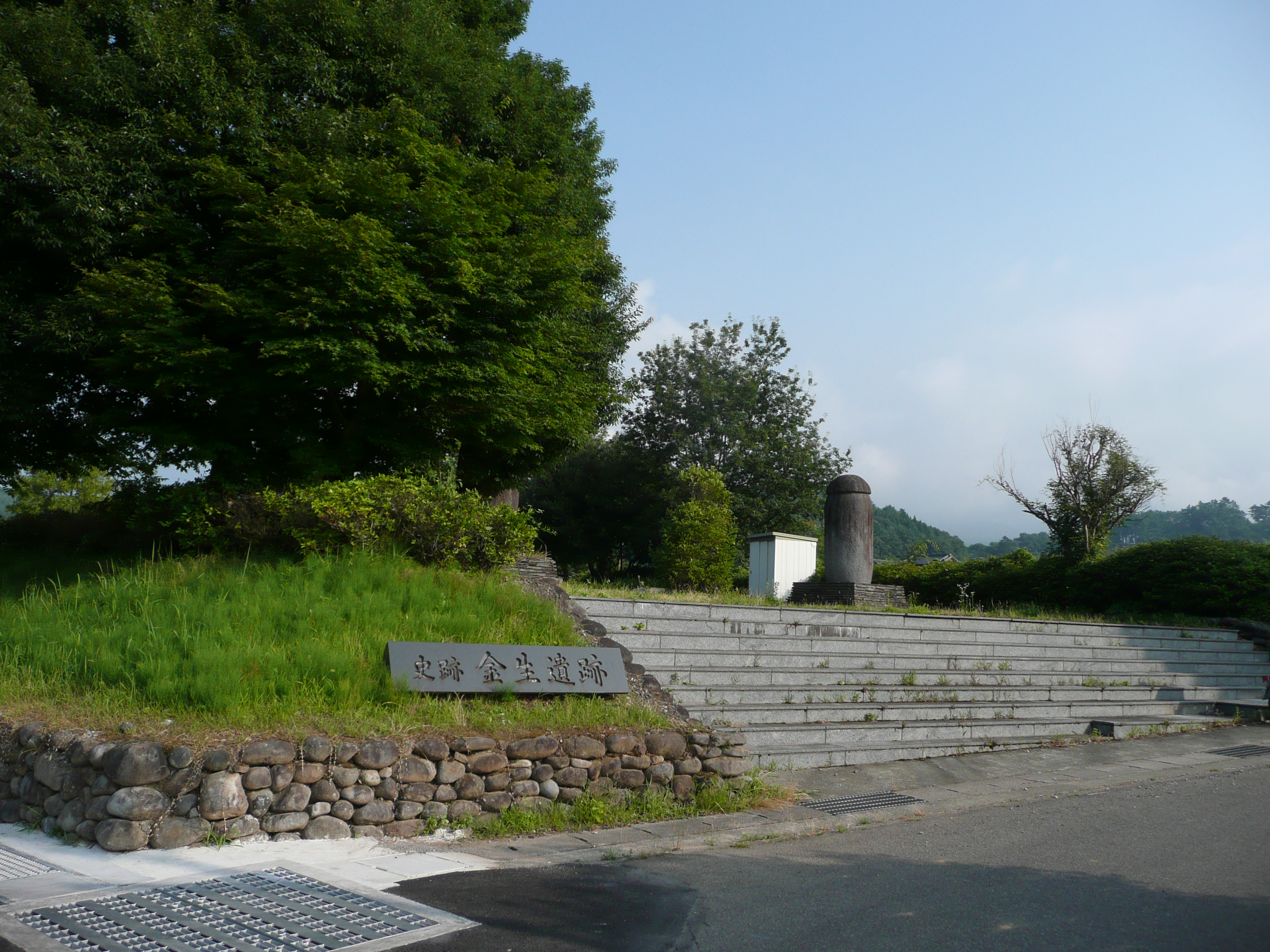 金生遺跡